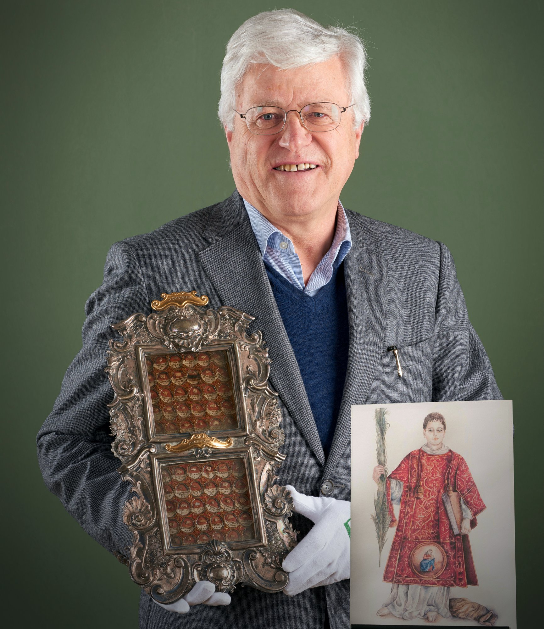 Museo Diocesano Hofburg di Bressanone: il direttore, dott. Johann Kronbichler, accanto al reliquiario-calendario, contenente un frammento osseo di S. Cesario diacono e martire, e alla nuova icona del santo.